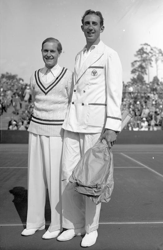 Deutschland und Irland im Kampf um den Davis-Pokal auf den Rot-Weiss-Tennisplätzen in Berlin ! Der Deutsche Tennisspieler Gottfried v. Cramm links und der beste Irländer [C. S.] Rogers rechts, vor dem Kampf.